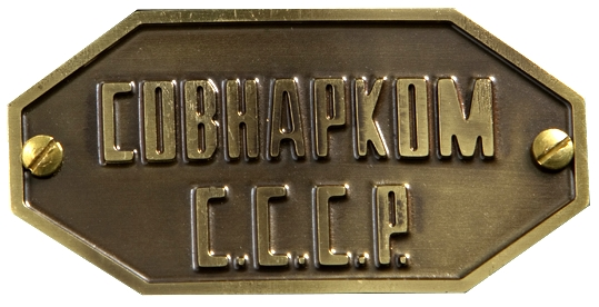 Cовнарком СССР